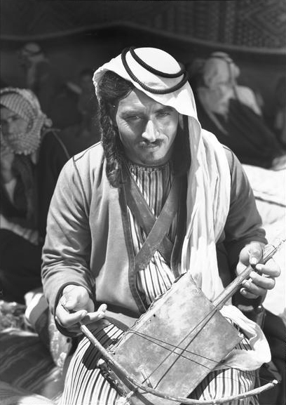 Transjordan Bedouin, Shibli Mjiali, playing the Rebabah.